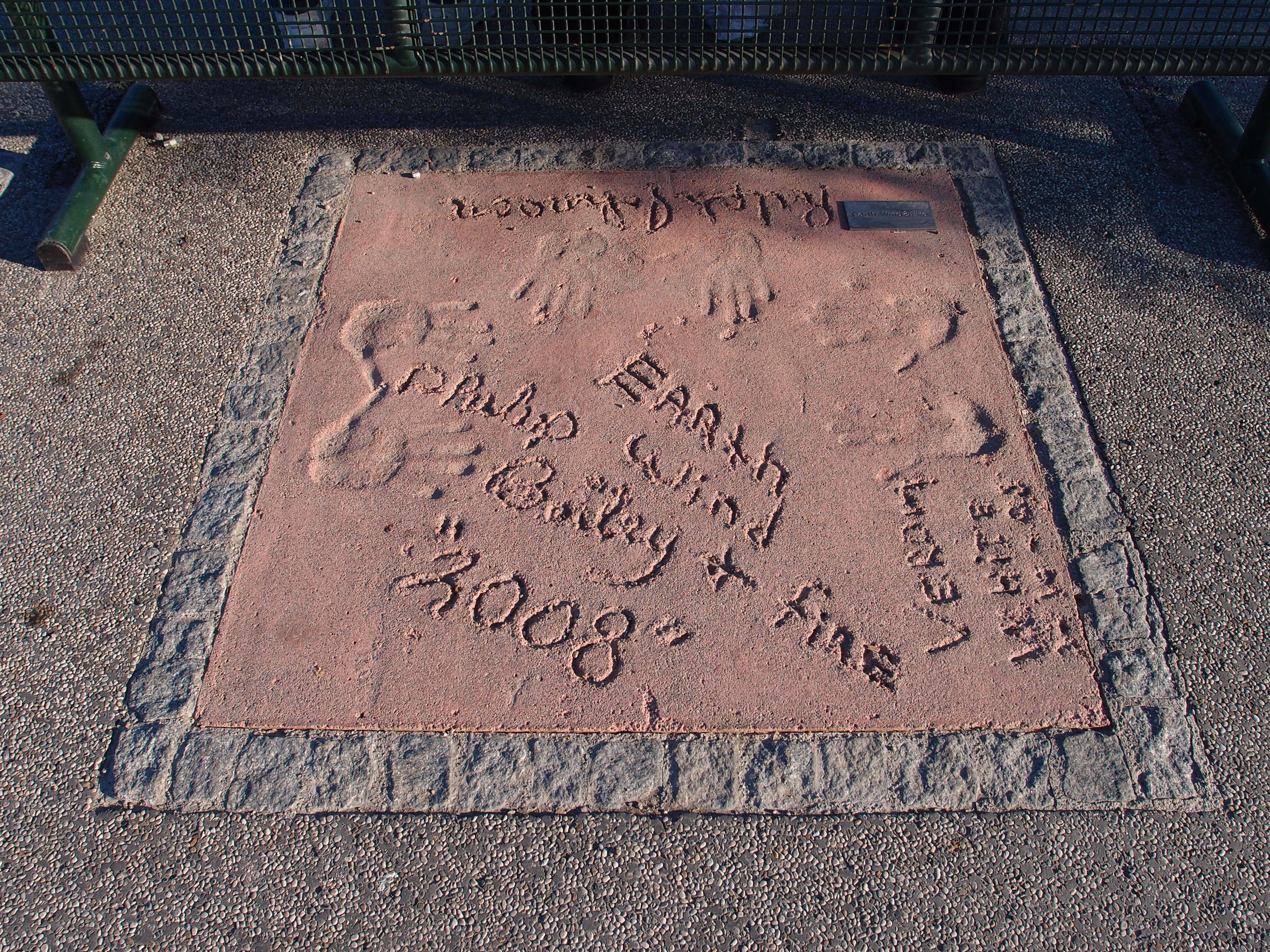 Earth, Wind and Fire (Handabdrücke und Namen der Band-Mitglieder); Munich Olympic Walk of Stars, München, Olympiapark